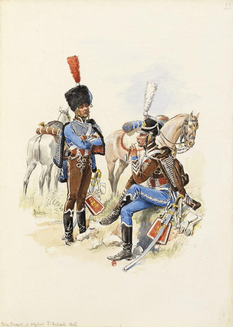 Brigadier-trompette et Adjudant du 2e Hussards en 1806.